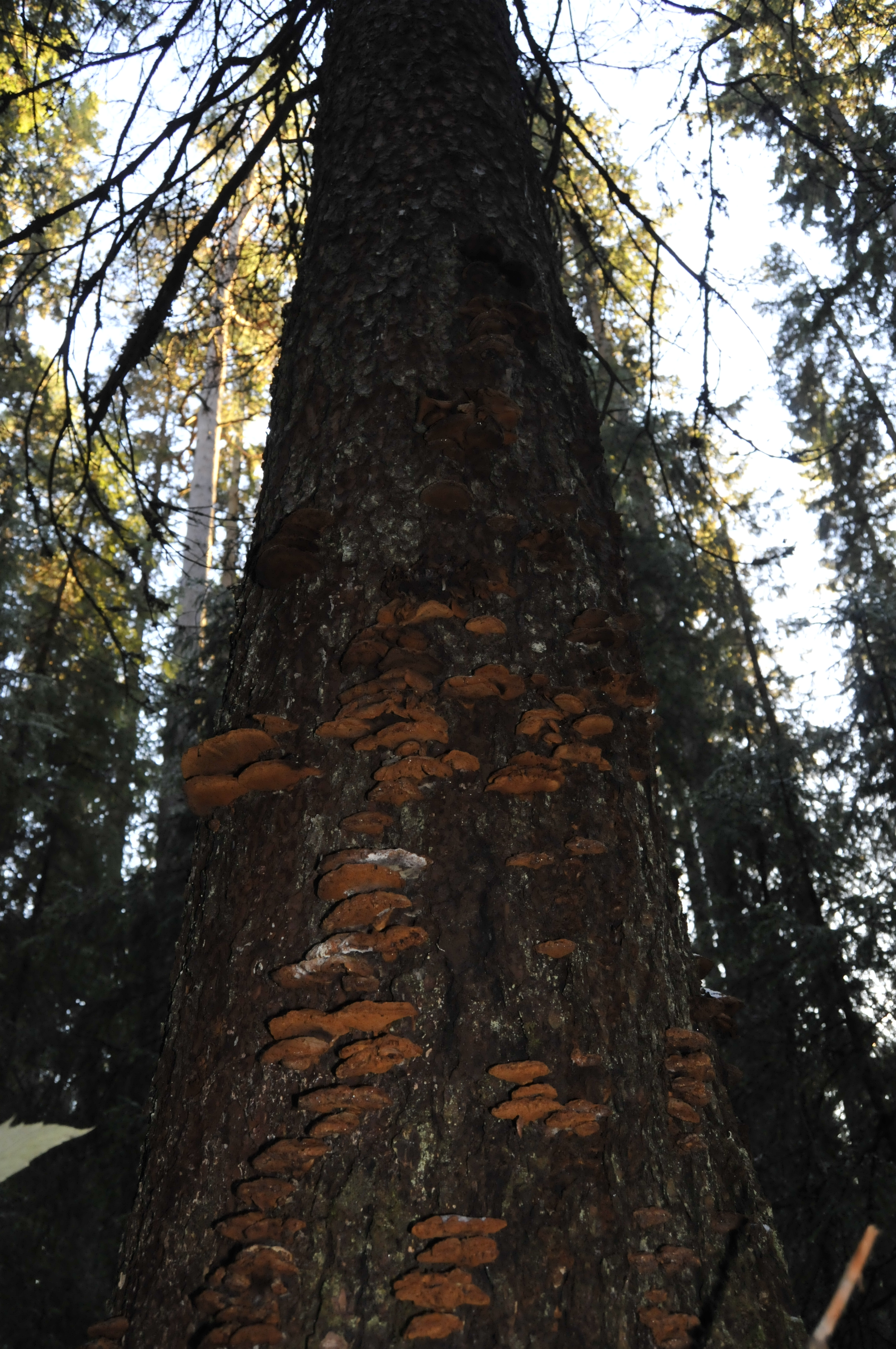 Tickor